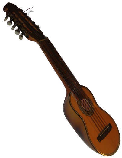 A bolivian charango (La Paz).